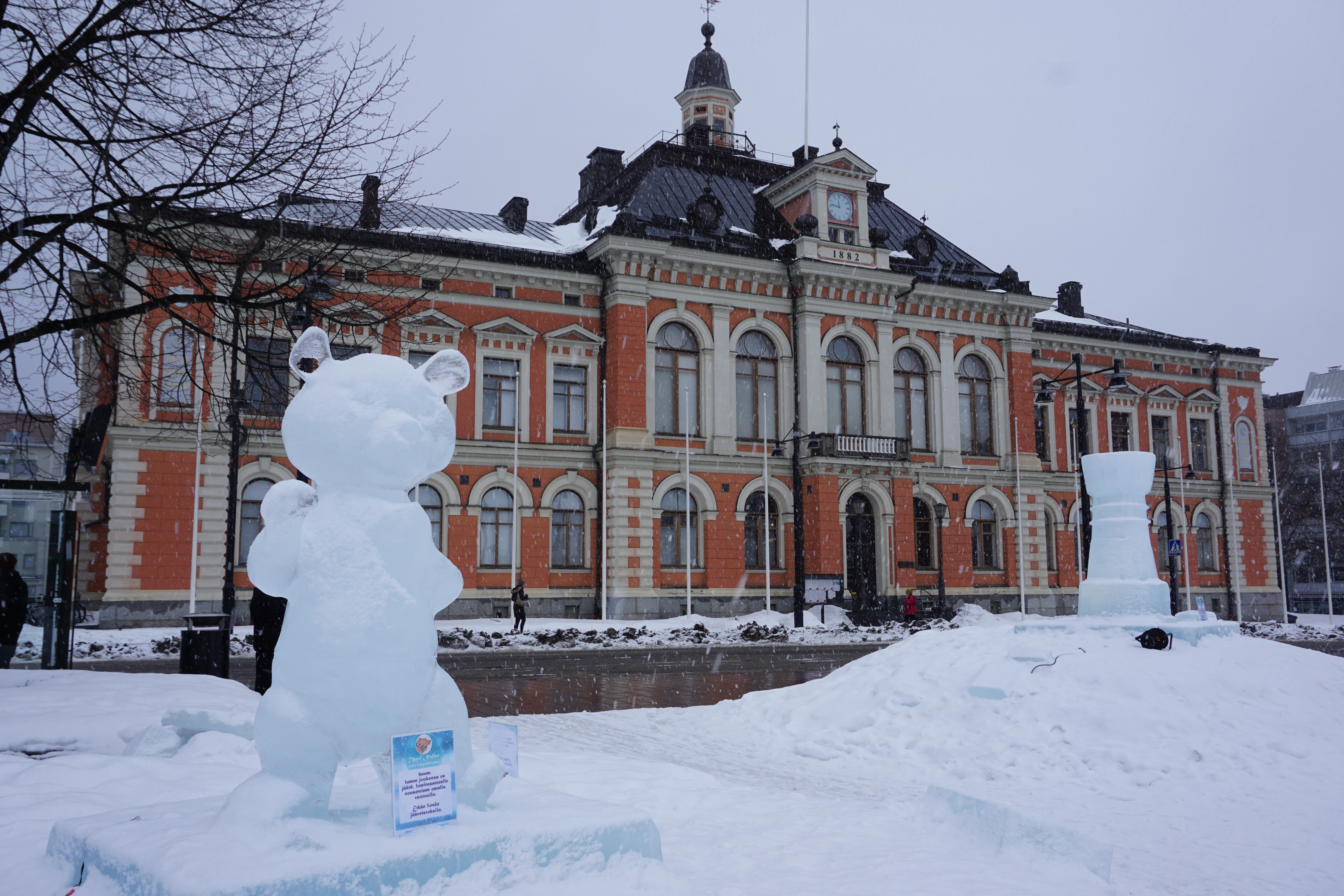 Kuopion kaupungintalo; building